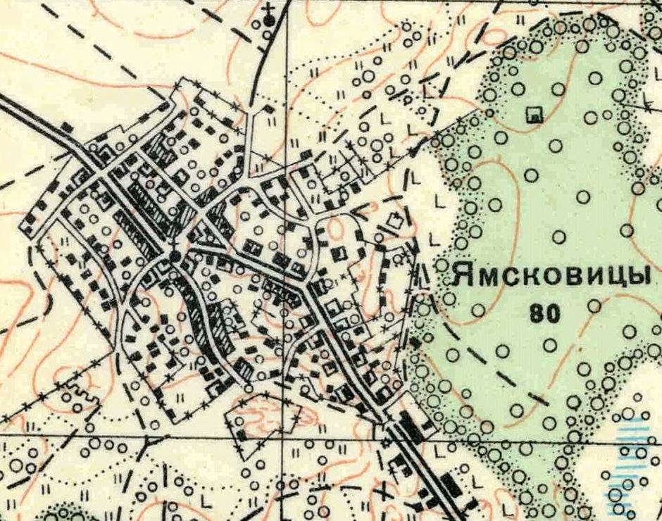 Топографическая карта Ленинградской области, квадрат О-35-22-Г-а (Керстово), деревня Ямсковицы.